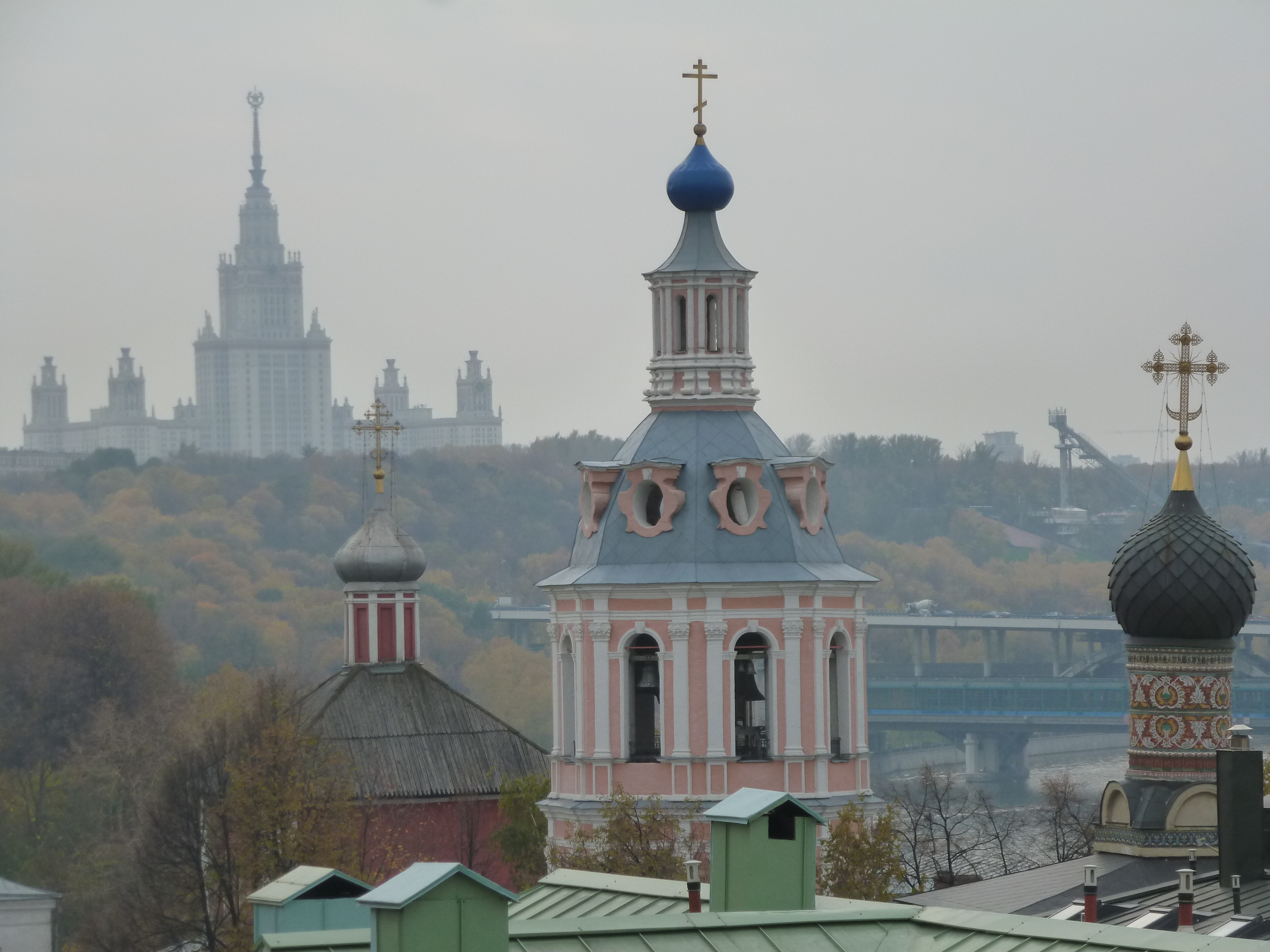 Andrea monahxejo kaj MSU, "Montoj Vorobjovi"